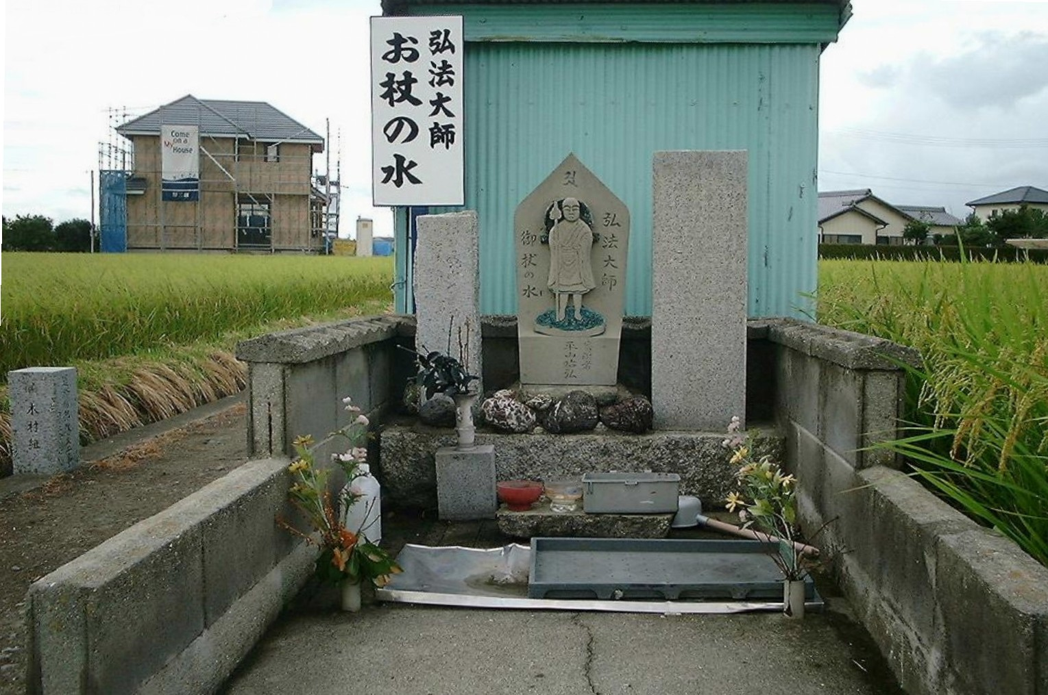 弘法大師お杖の水（徳島県小松島市）